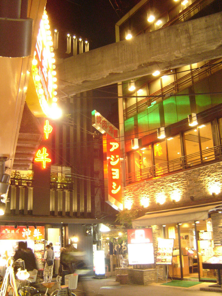 Une vue de Korea Town. Le coin est couvert sauf ici, où il y a une ouverture vers le ciel.鶴橋駅周辺にある生野コリアンタウンの鶴橋駅前には、多数の焼肉屋がある。Korea Town